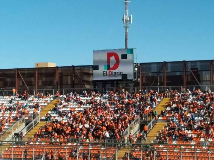 El Diario de Antofagasta en el Estadio Zorros del Desierto de Calama